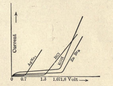 Potenziali di decomposizione